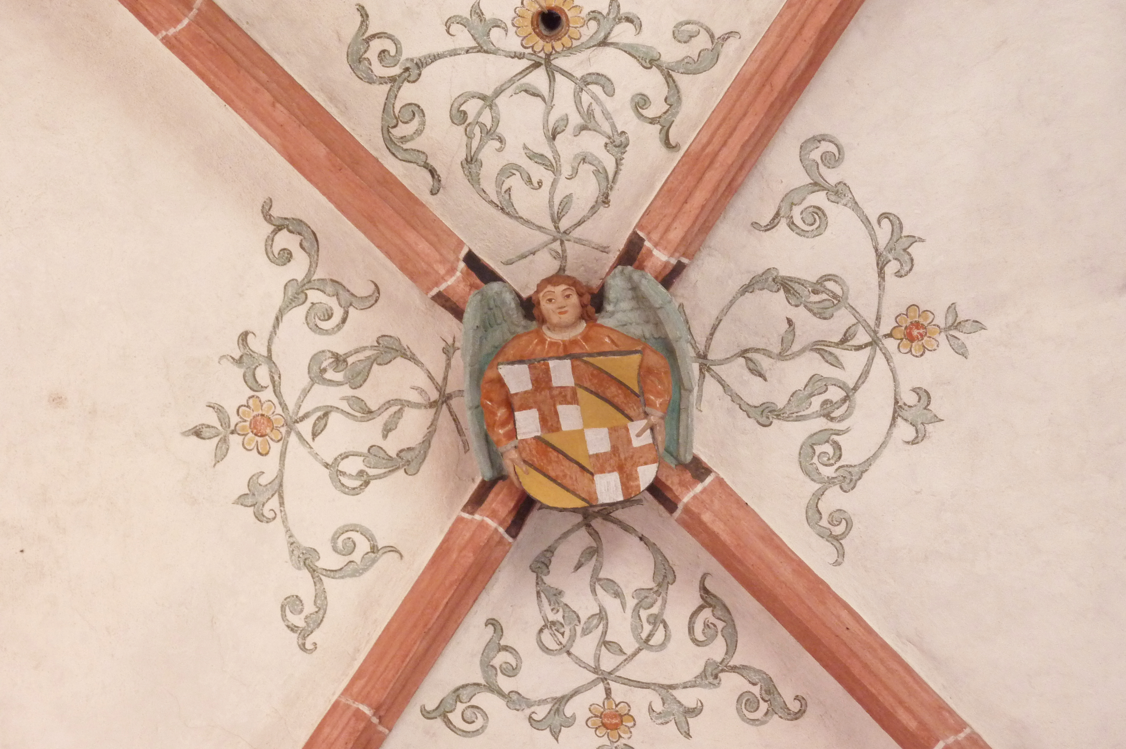 Katholische Wallfahrtskirche Mater Dolorosa in Driesch, einem Ortsteil von Lutzerath im Landkreis Cochem-Zell (Rheinland-Pfalz), Schlussstein, Darstellung: Engel mit Wappen des Trierer Erzbischofs Johann II. von Baden